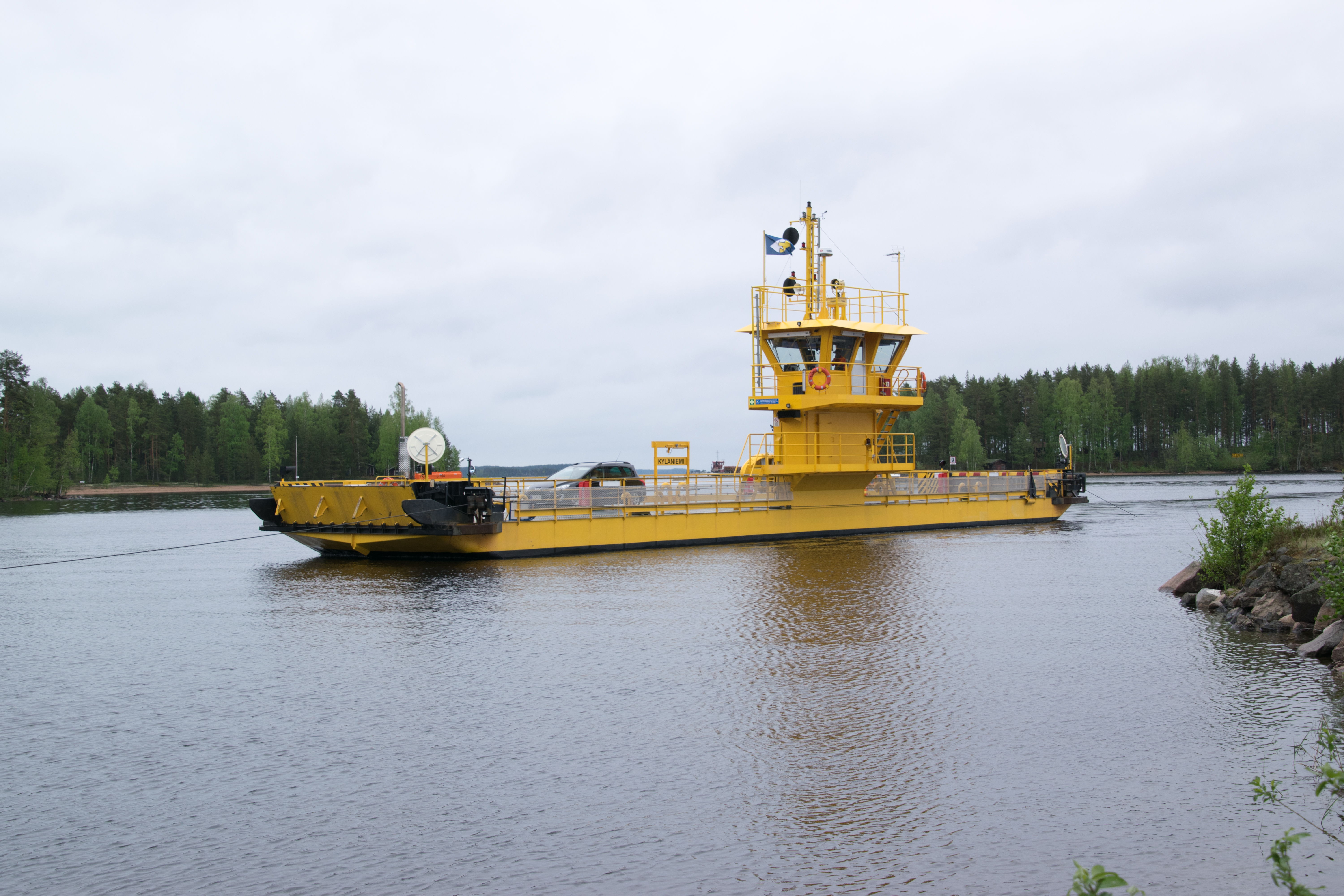 Kyläniemen lossi